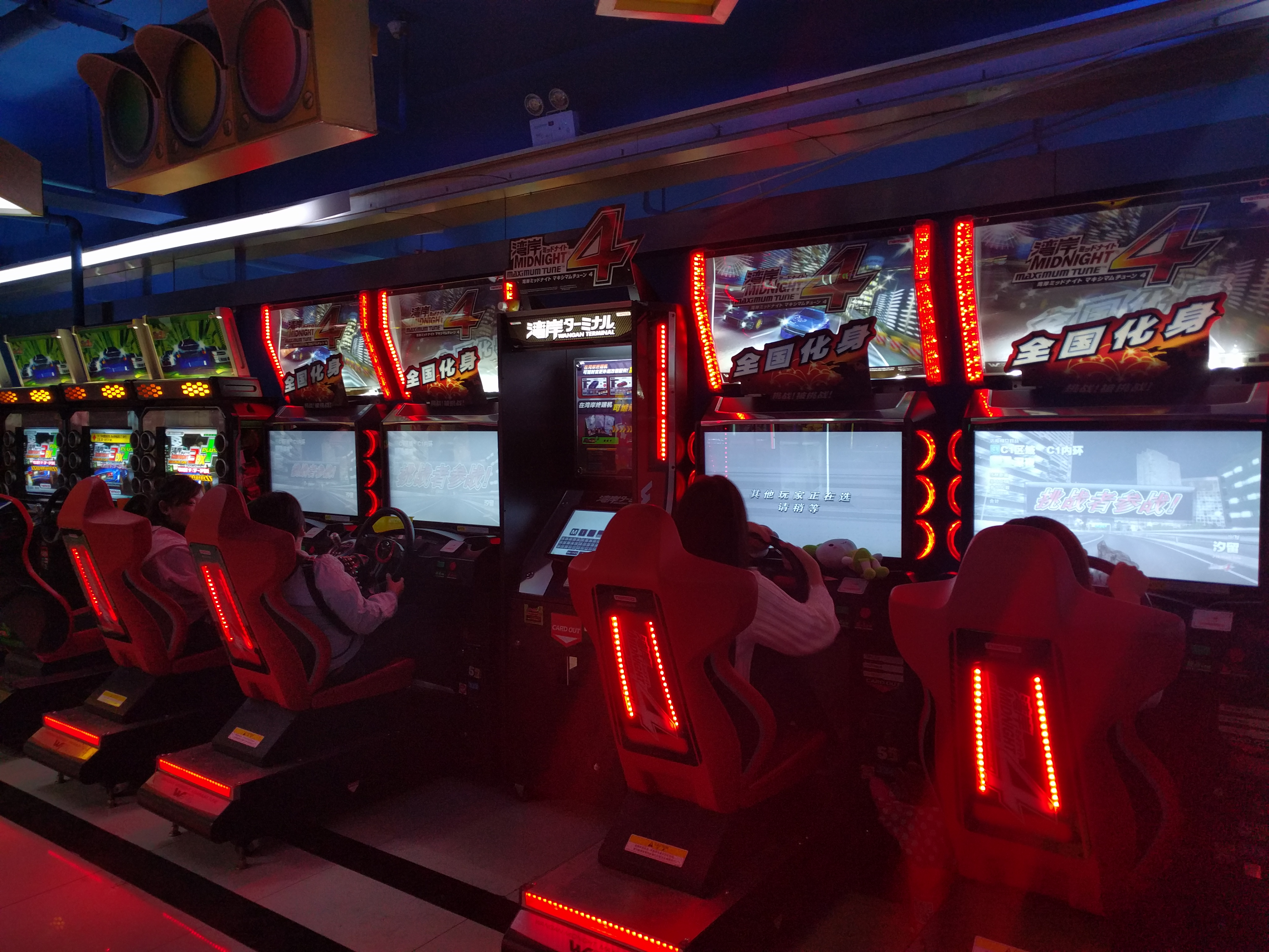 湾岸Mid-Night Maximum Tune 4中国版